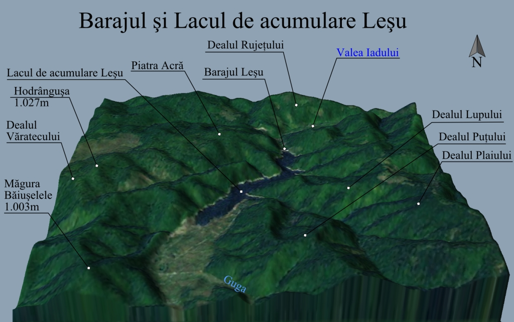 Harta 3D pentru Barajul si Lacul de acumulare Lesu, Romania.